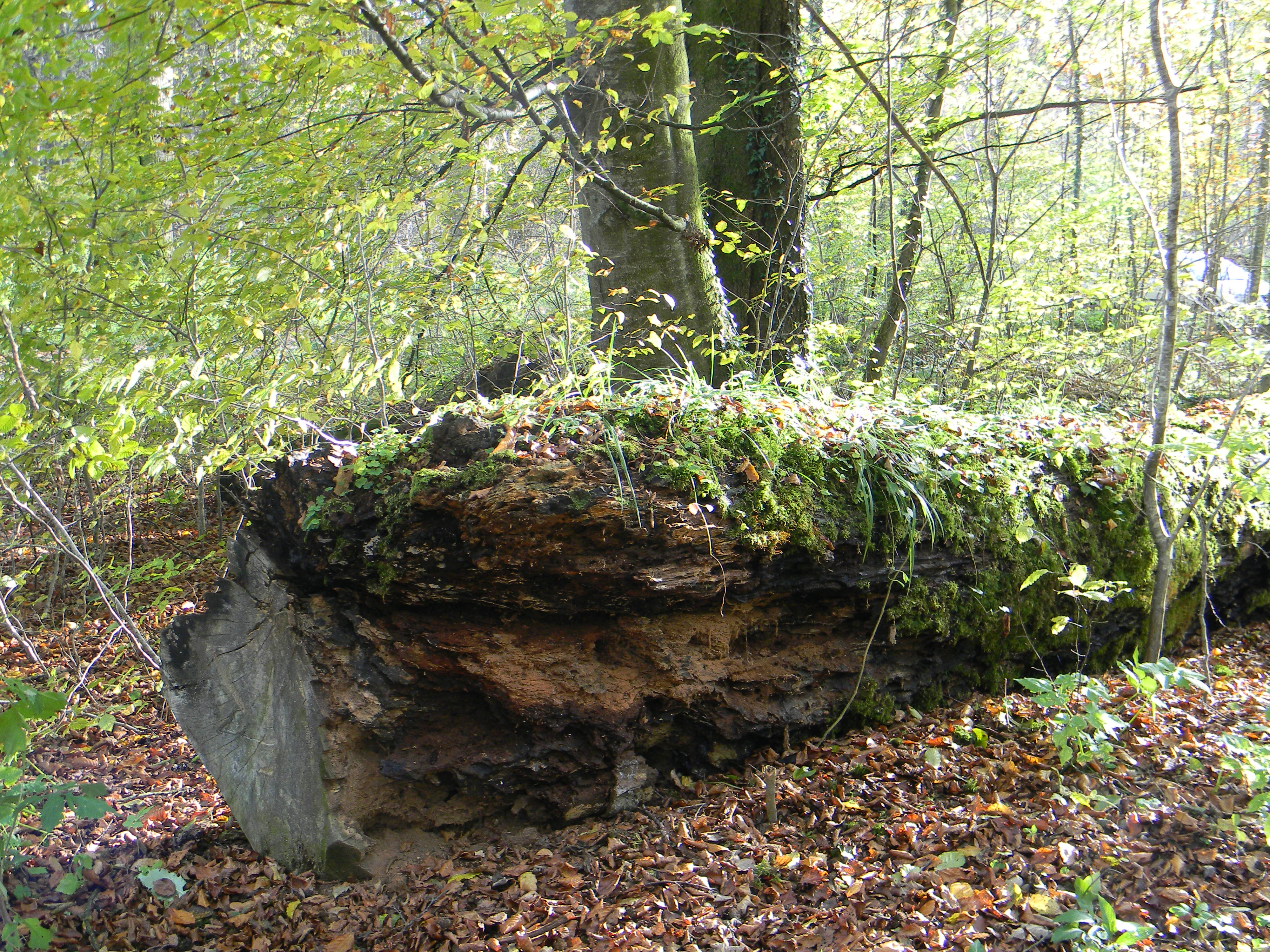 Totholz im Westerwald bei Kaufering